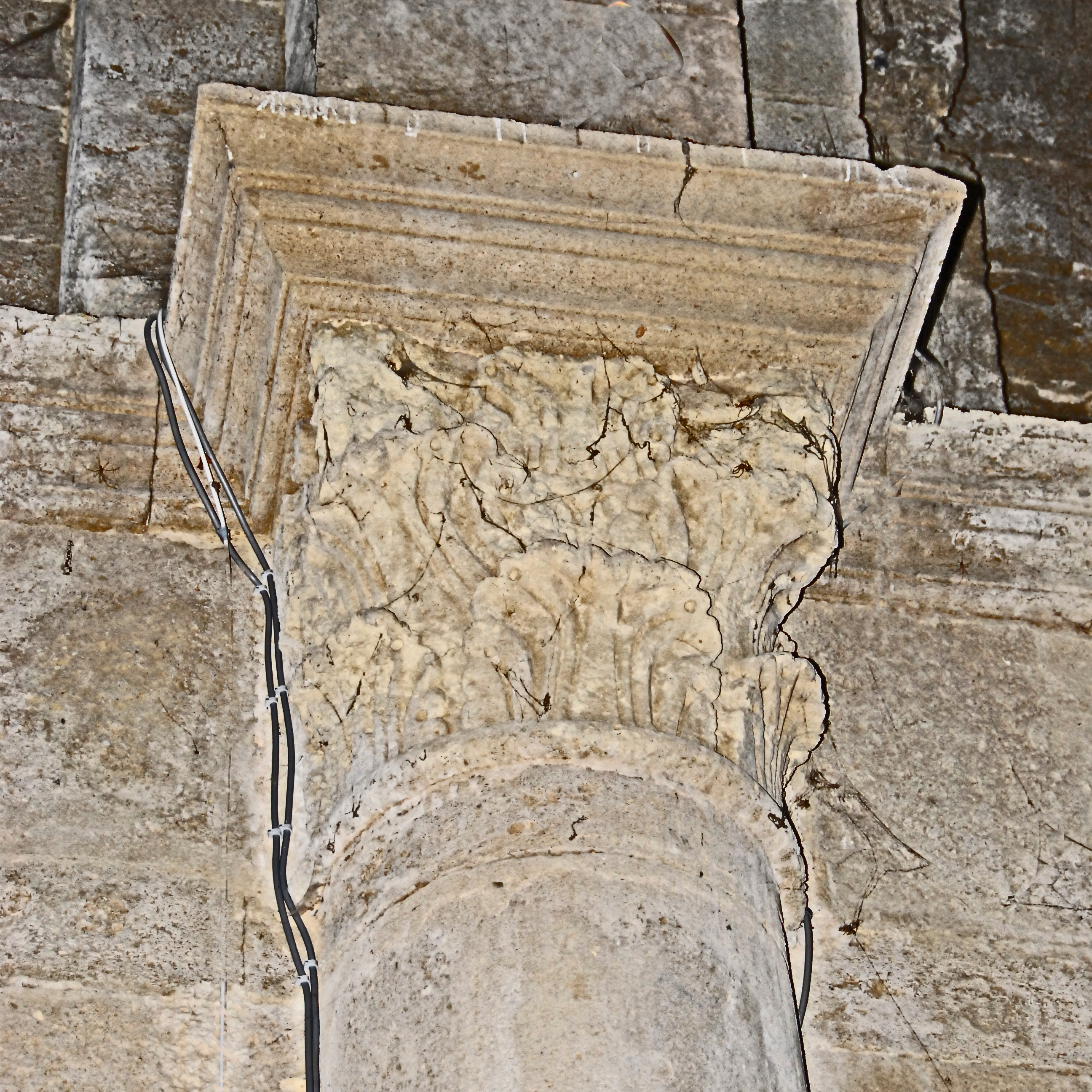 St-Pierre-et-St-Paul de Maguelone, Kapitell über Empore